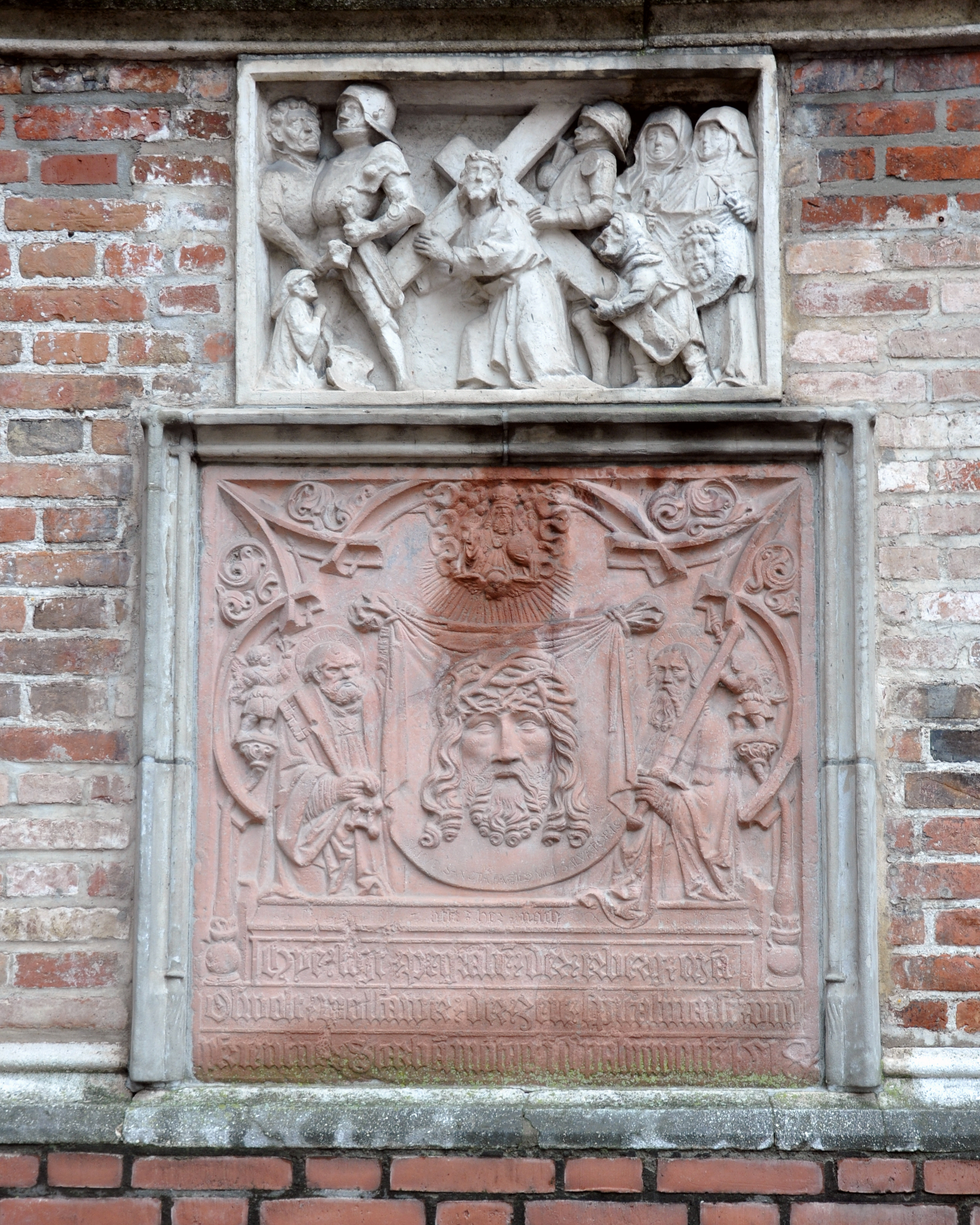 Landshut, Heilig-Geist-Kirche, Außenwand, Relief Kreuztragung und Epitaph